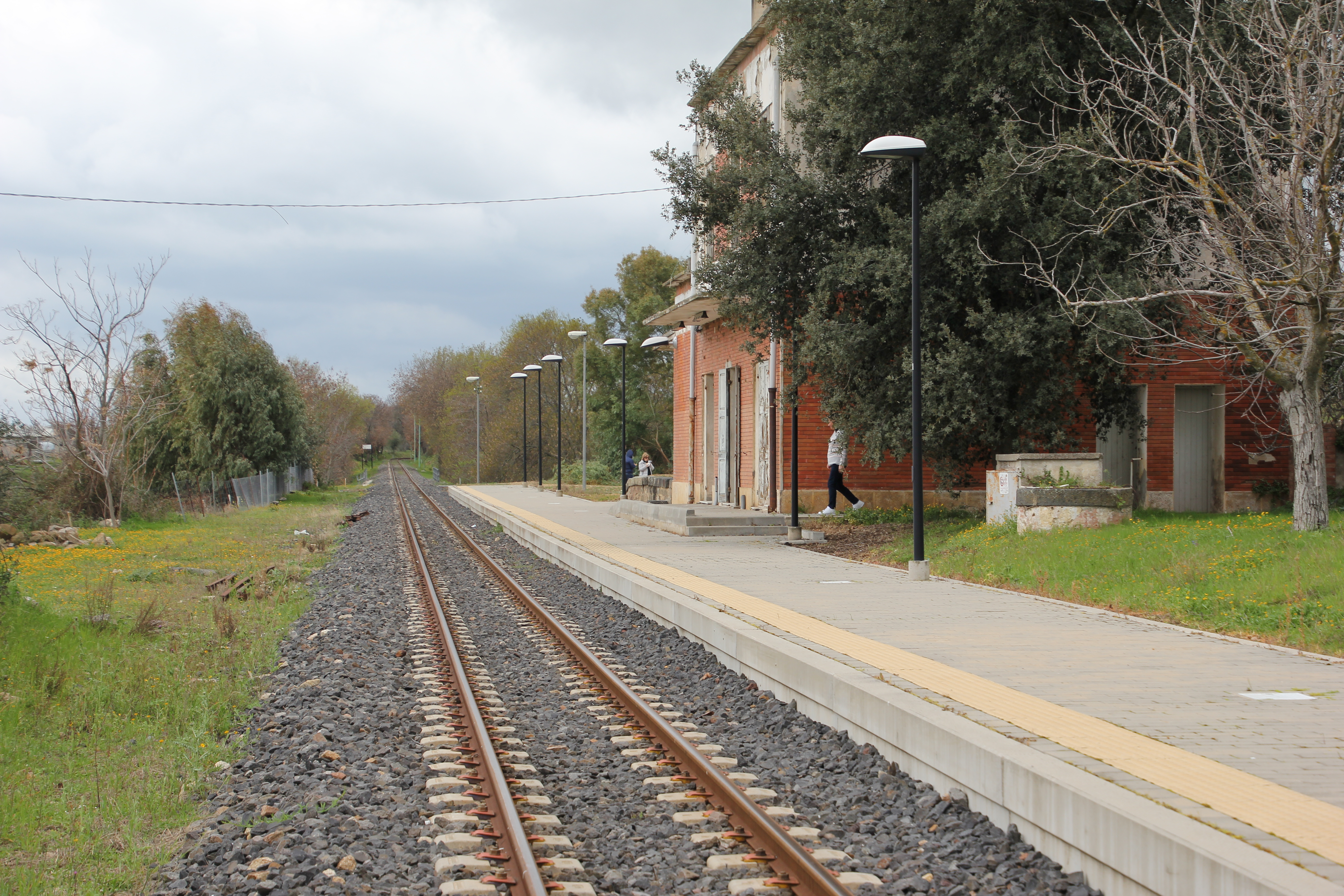 Lei, stazione ferroviaria